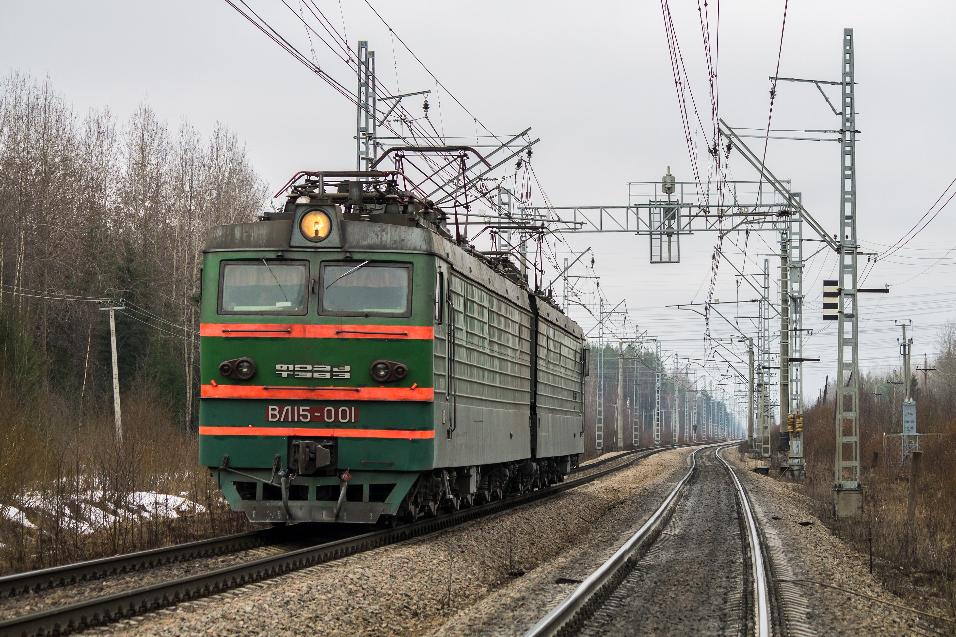 ВЛ15-001, станция Стекольный см. фото 692480 в альбоме автора